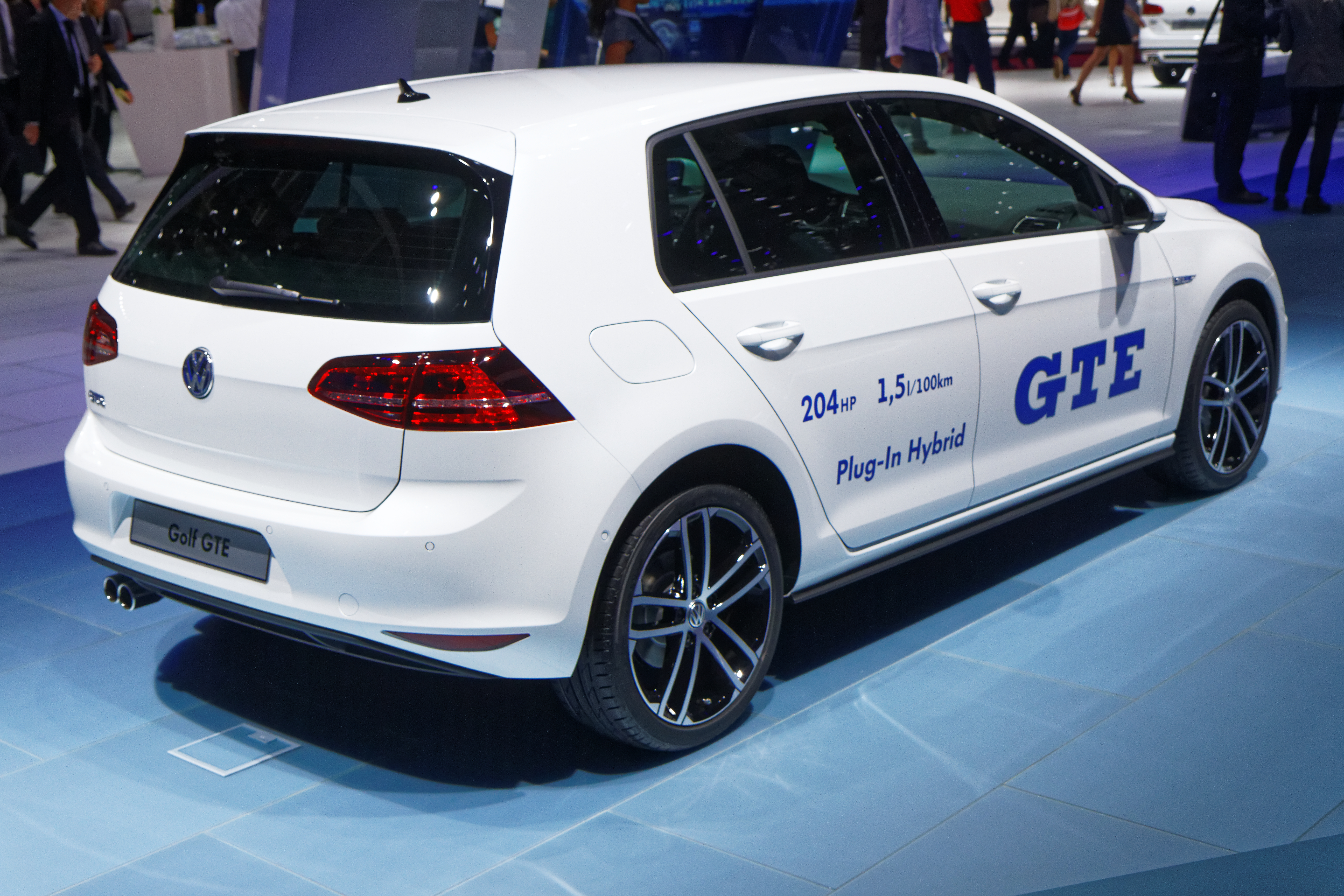 Une Volkswagen Golf GTE présentée lors du mondial de l'automobile de Paris 2014.